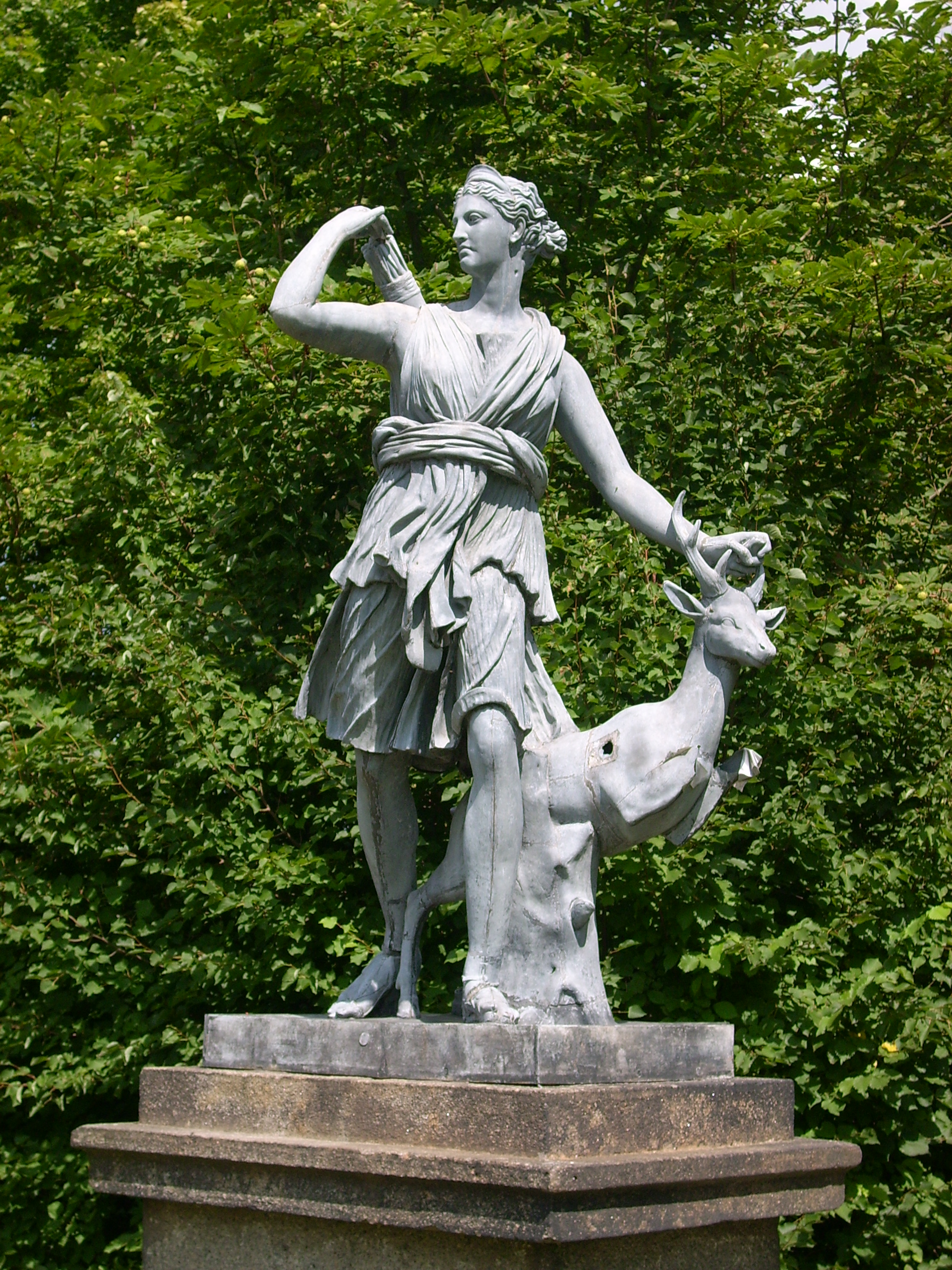 Statue der Jagdgöttin Diana am Kastanienweg in Hermsdorf/Spree, Ortsteil von Lohsa; metallene Kopie der Marmorskulptur „Diana von Versailles“ im Pariser Louvre